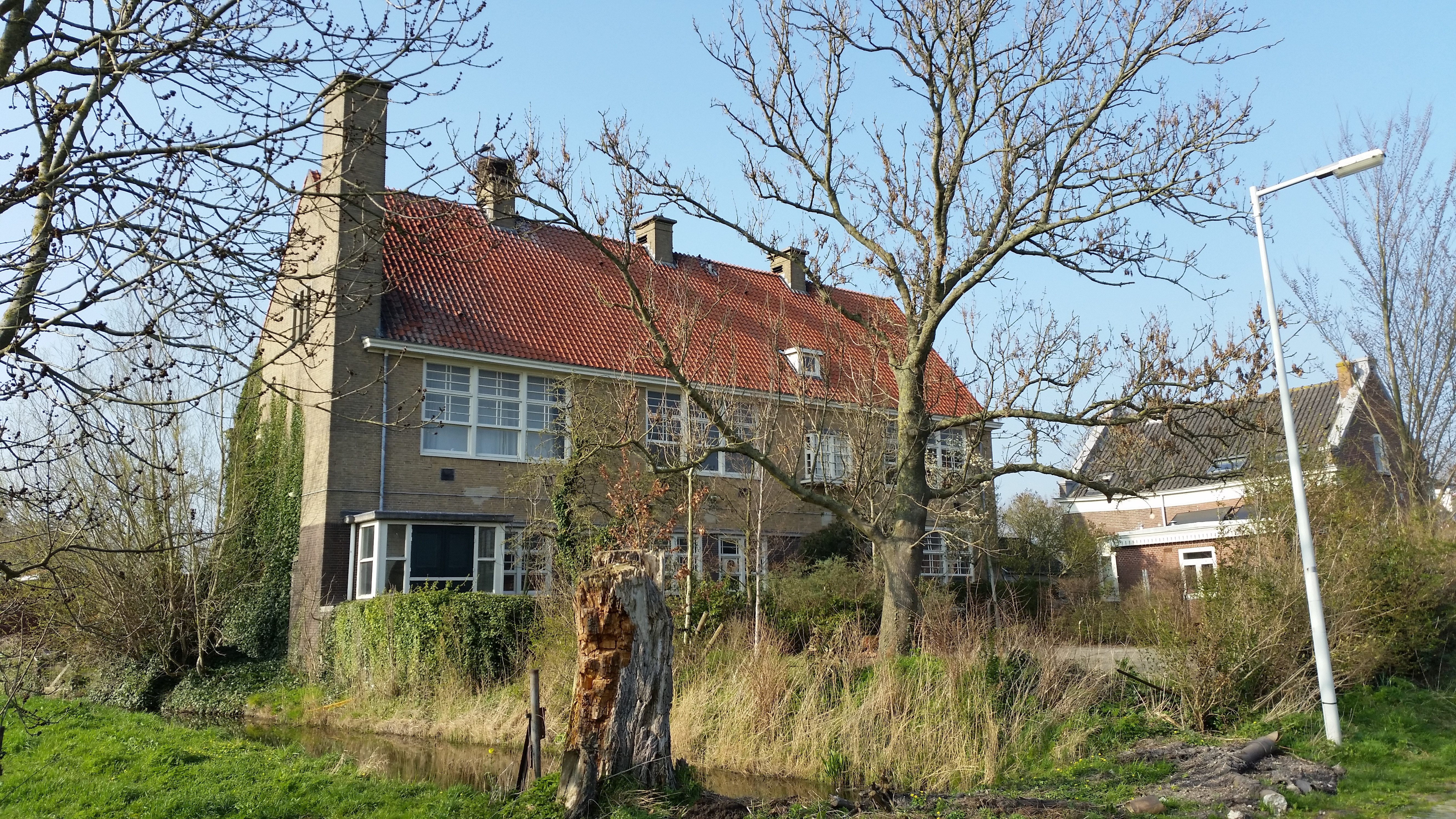 Lutkemeerweg 635, Amsterdam, voormalige school